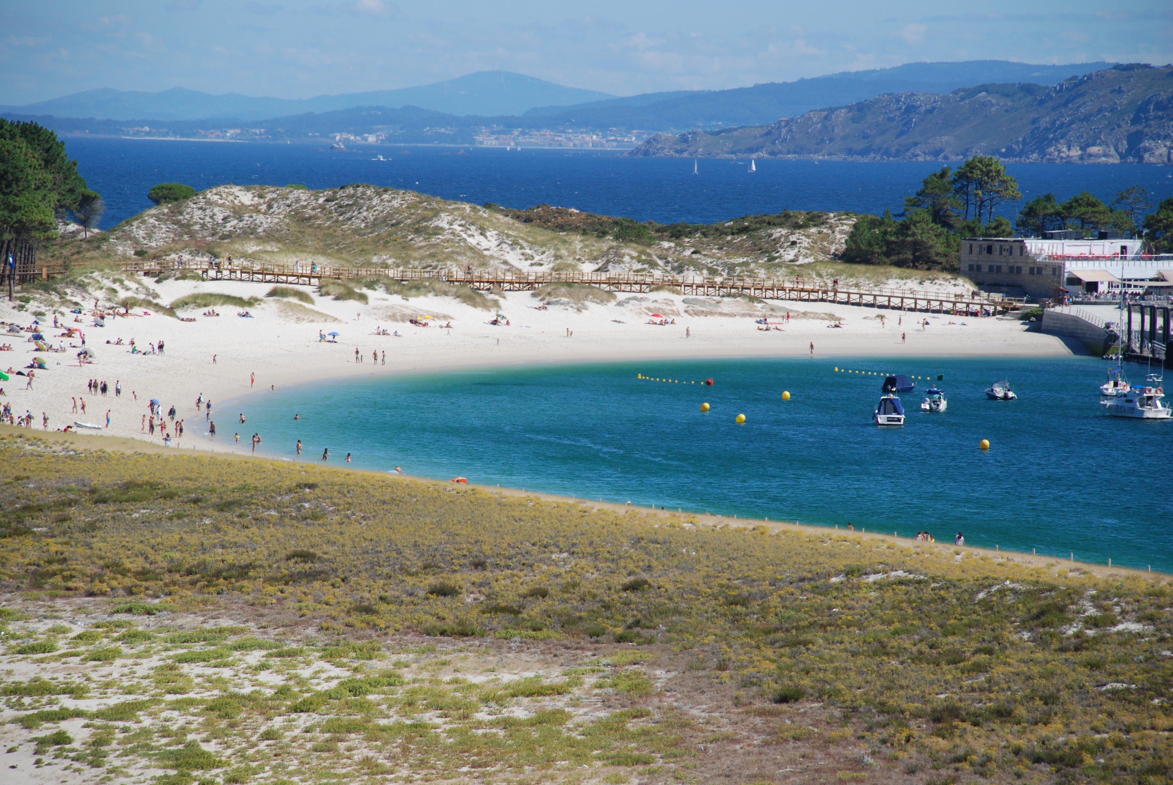 Playa de Islas Cíes, Vigo.